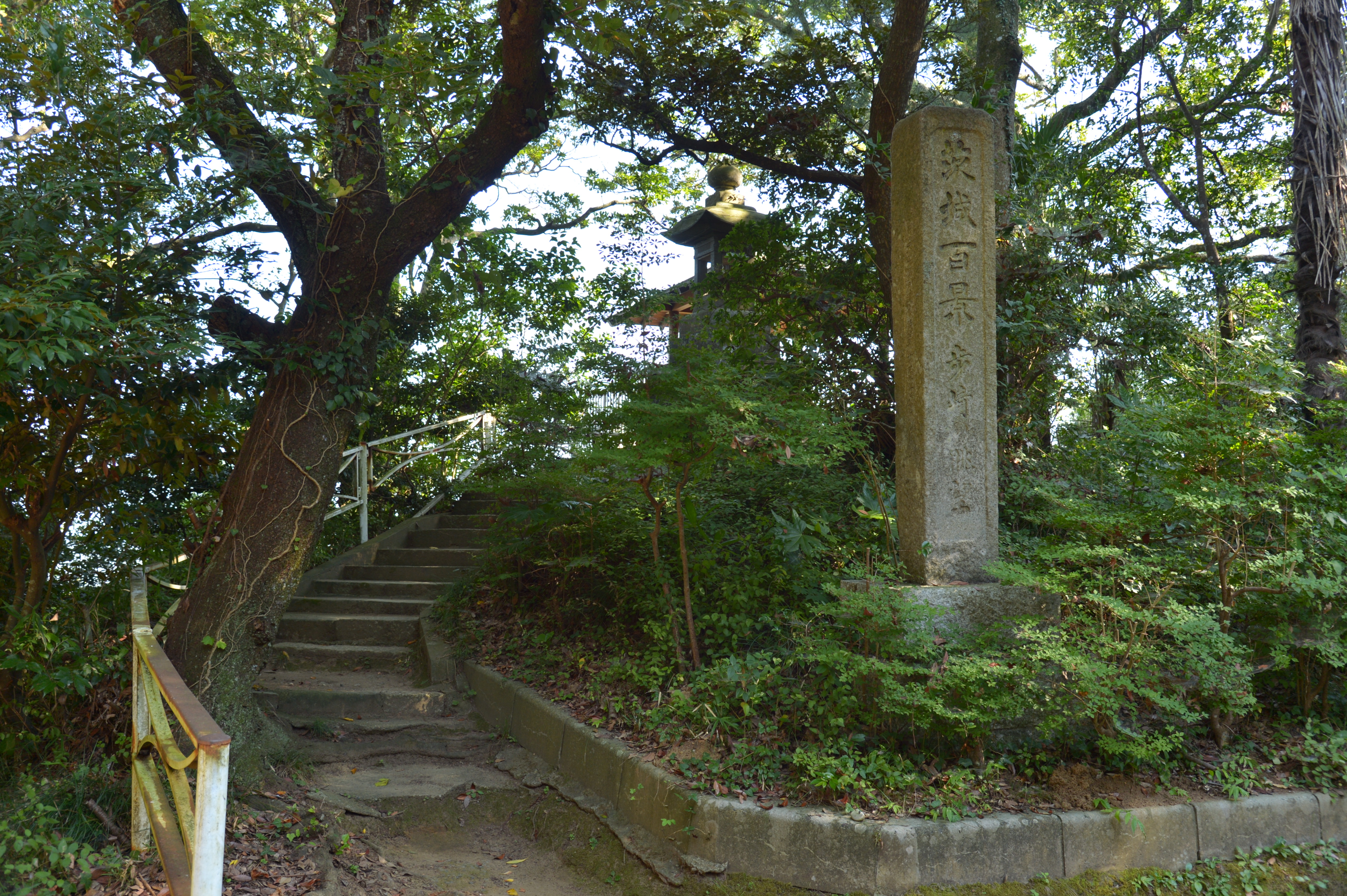 茨城百景「歩崎の眺望」の石碑がある、歩崎観音展望台前。展望台から、霞ヶ浦（西浦）を展望できる。